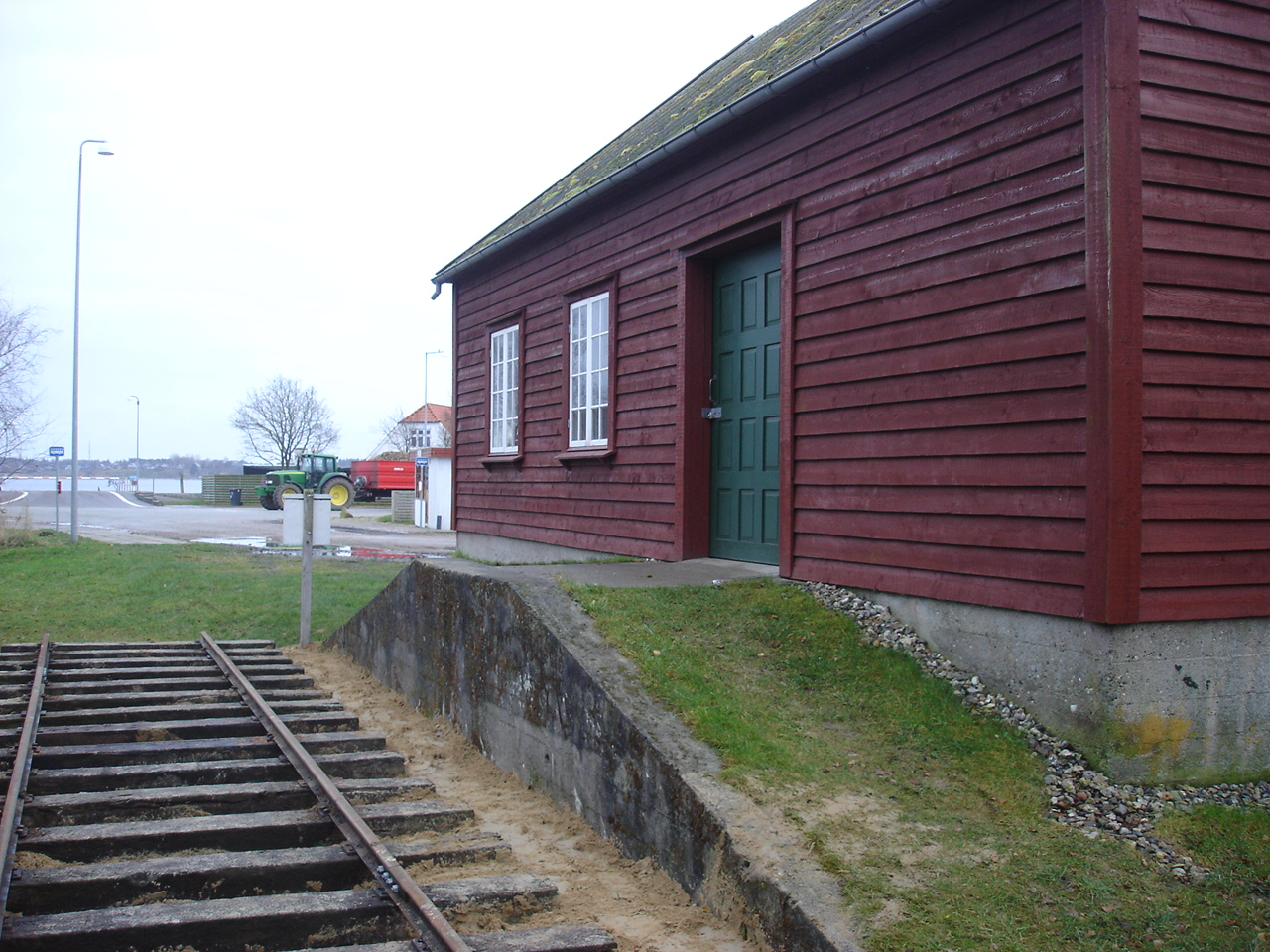 Sundsøre Pakhus, sporsiden fra V